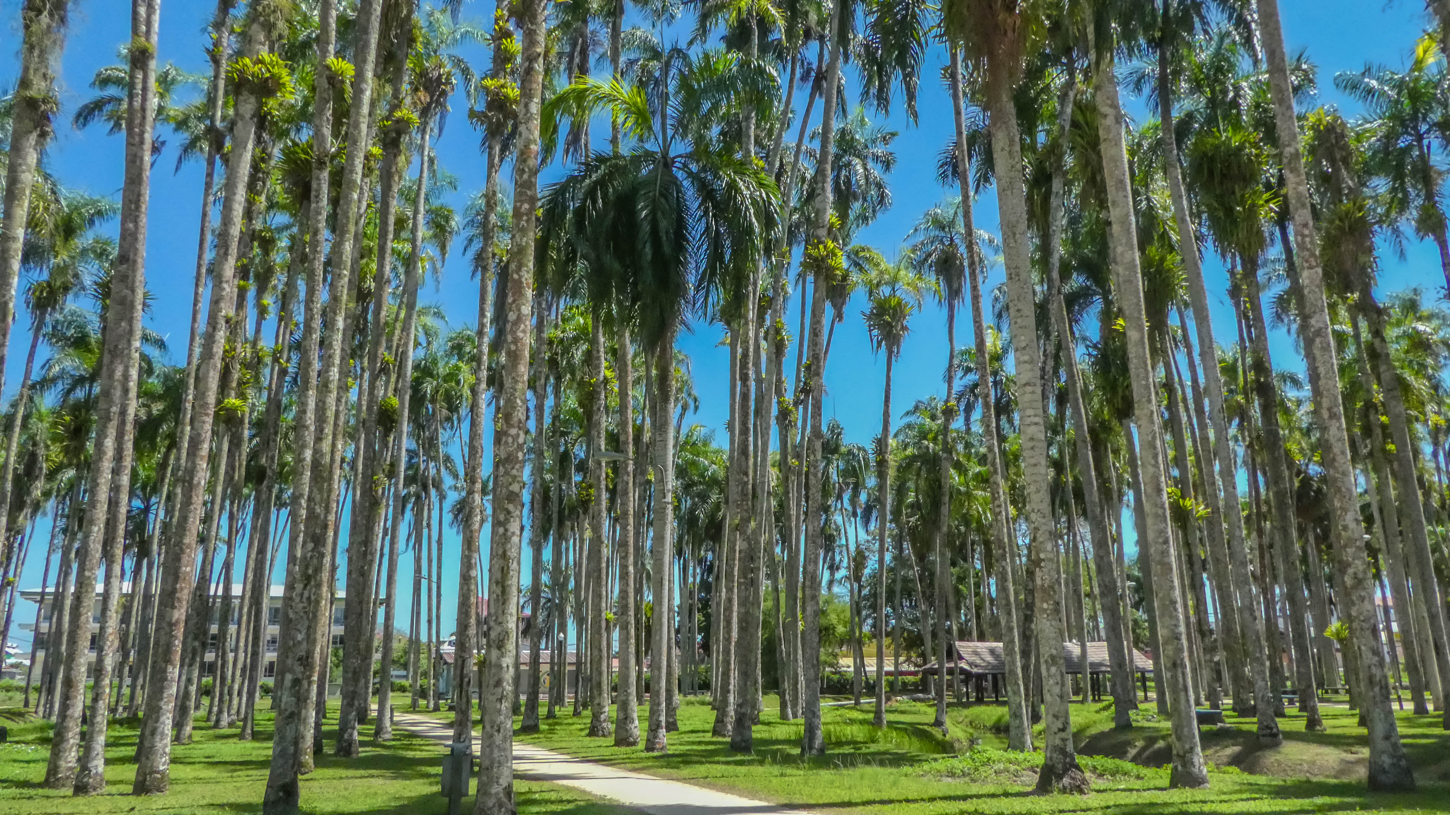 Palmentuin, Paramaribo